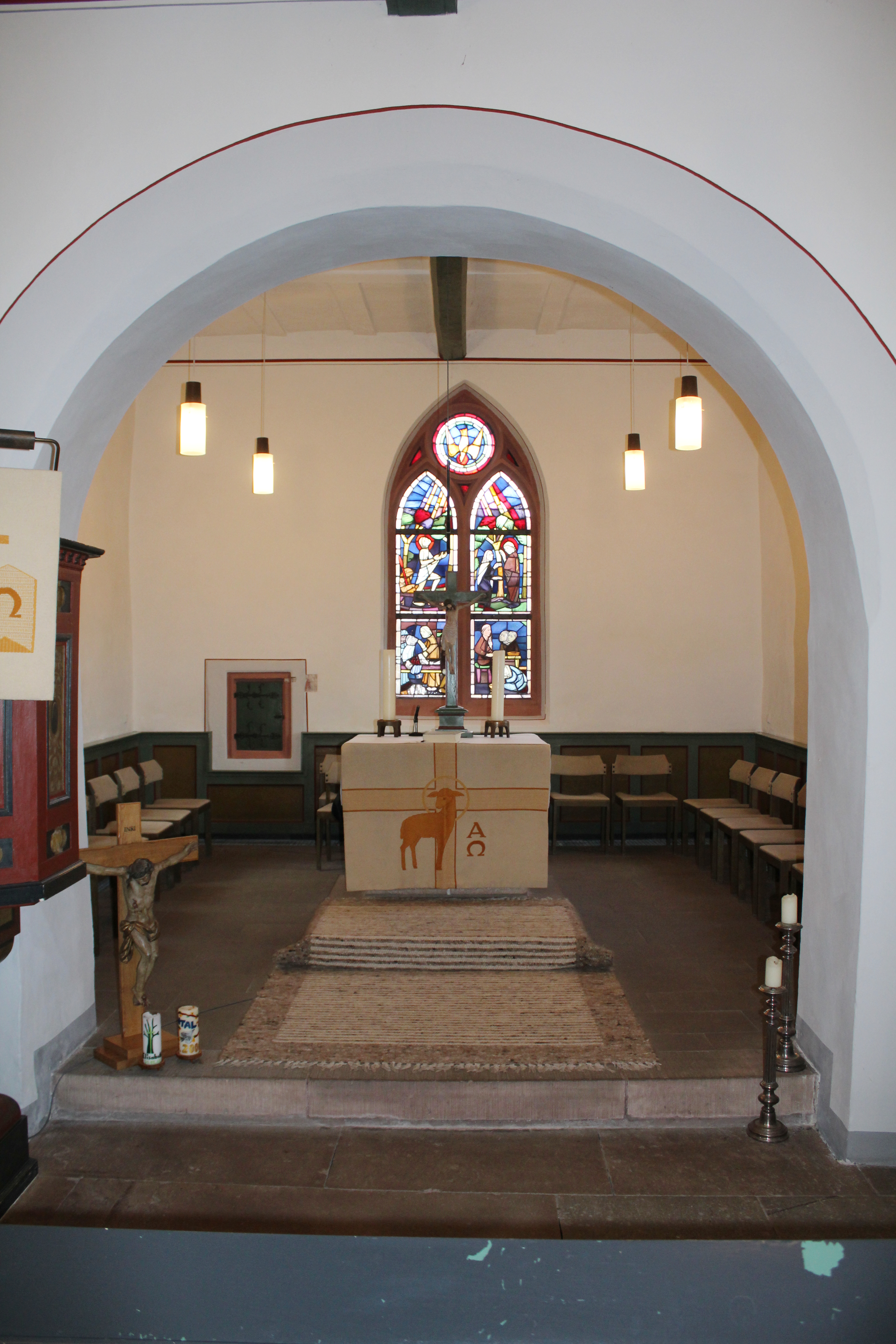 Evangelische Kirche Wolfshausen, Weimar/Lahn, Landkreis Marburg-Biedenkopf, Hessen, Deutschland